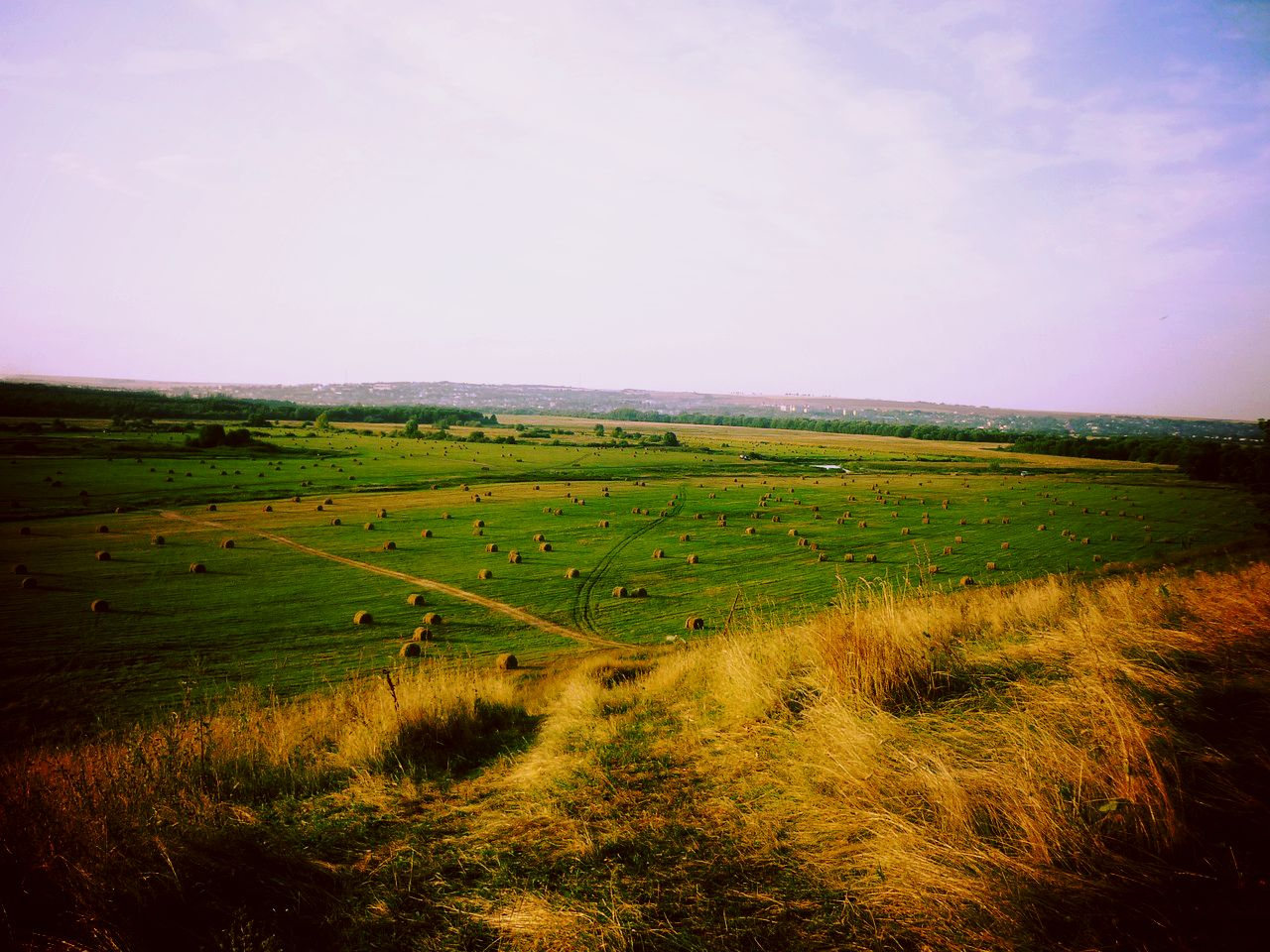 Кочкопожарки стога